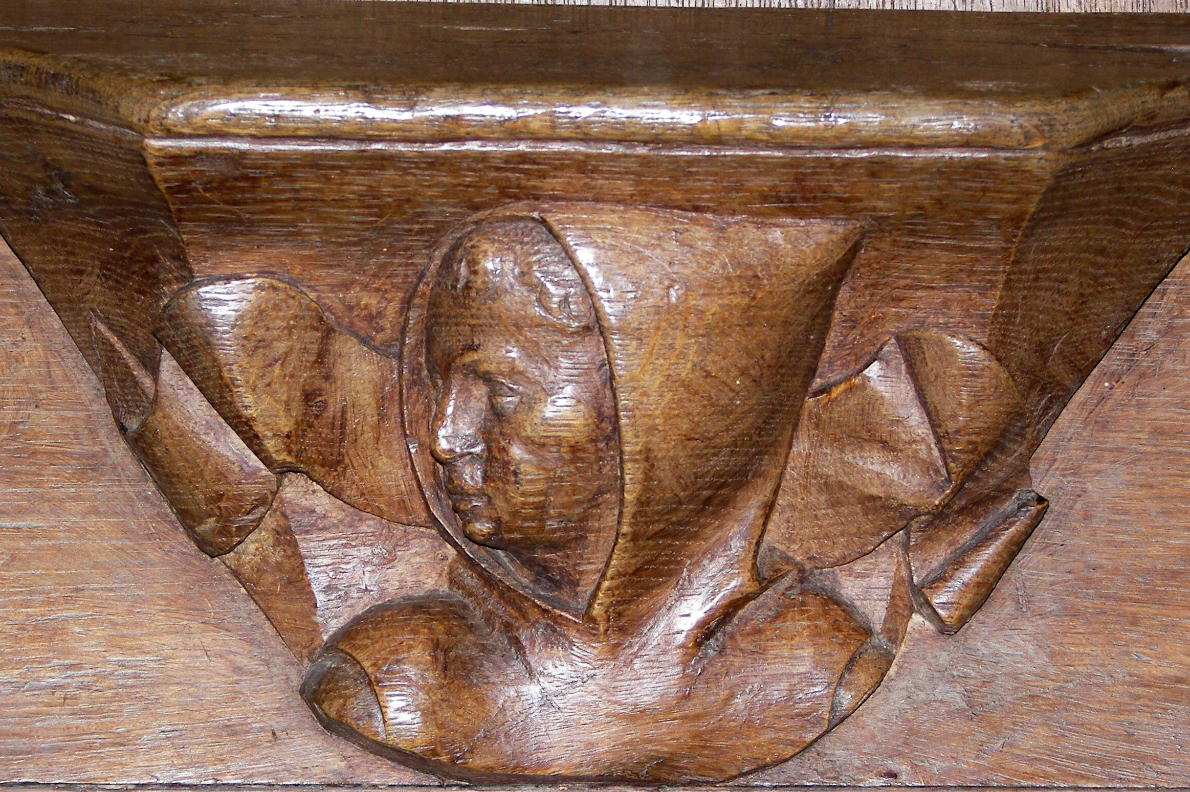 Miséricorde de l'églist Ste Marie de Pont Sainte Marie (10) France